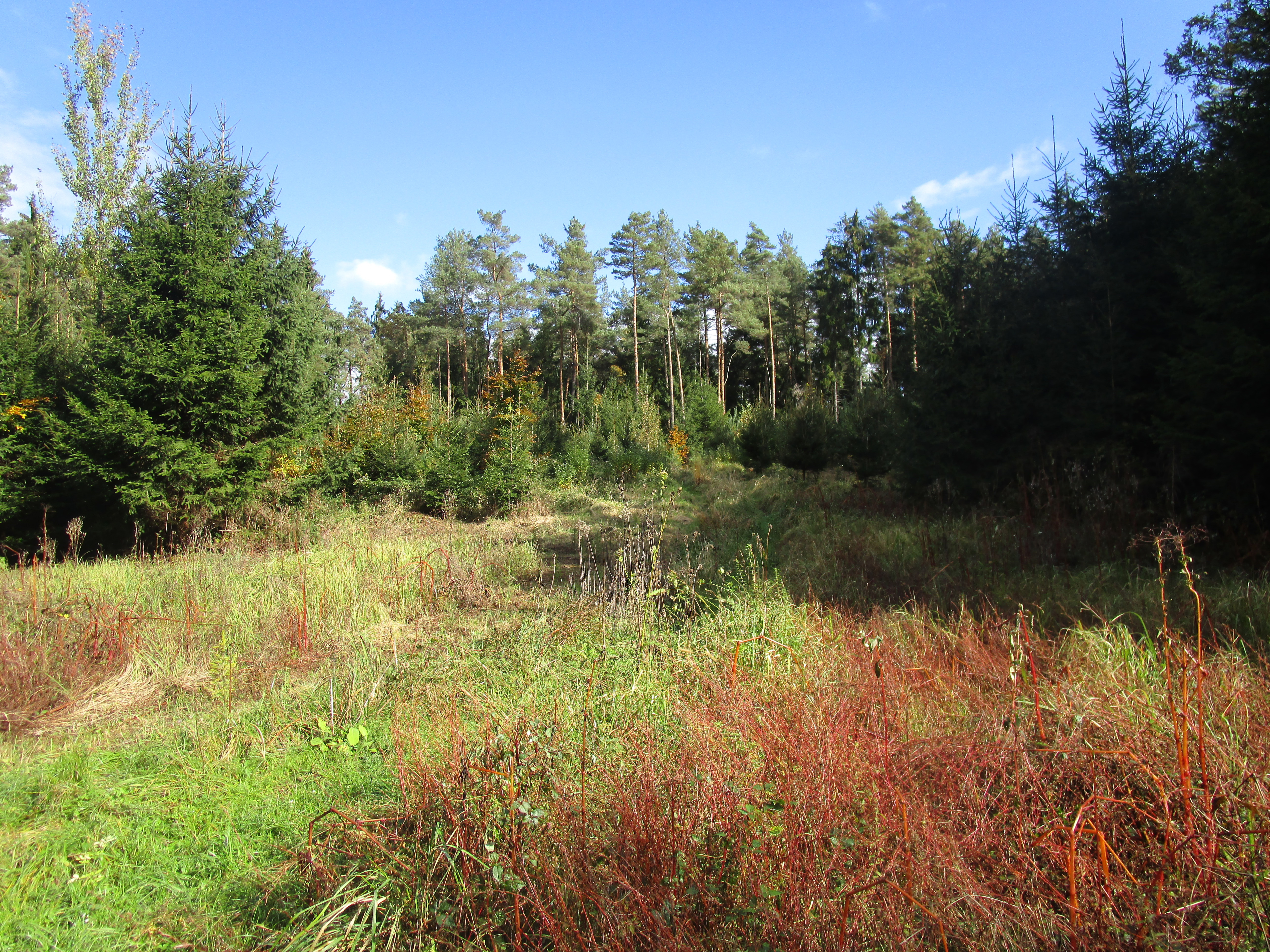 Kaiserwald im Süden der Gemeinde Seiersberg-Pirka